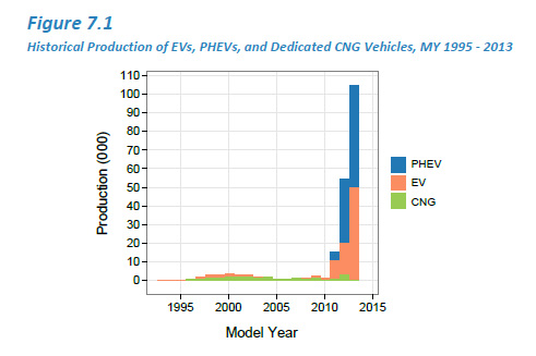 סה"כ ייצור רכבים קלים - מונעים הגז, חשמל (מצבר) ורכבים היברידיים-נטענים